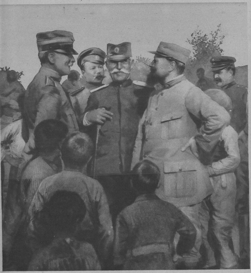 collaboration des Alliés : Capitaine_italien,_Lieutenant_russe,_Colonel_serbe,_Lt_français, gendarme_grec (de gauche à droite).